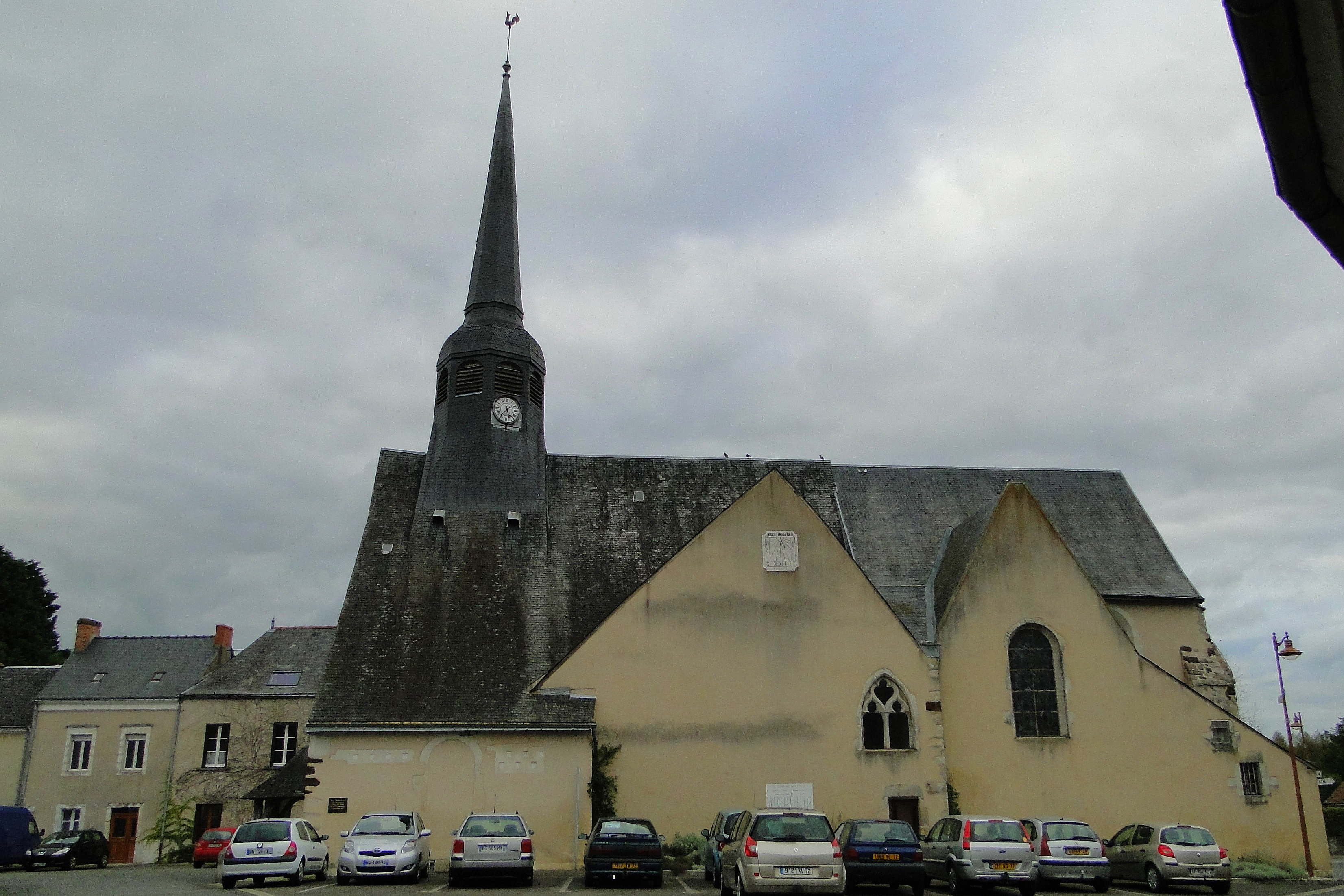 Eglise Notre-Dame de Cérans (Sarthe)